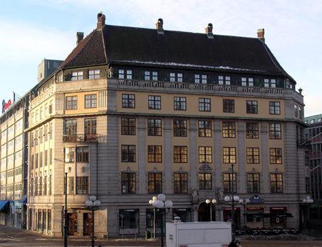 Jernbanetorget 2, Oslo. Built for Den Norske Amerikalinje 1919. Architects Andreas Bjercke and Georg Eliassen.